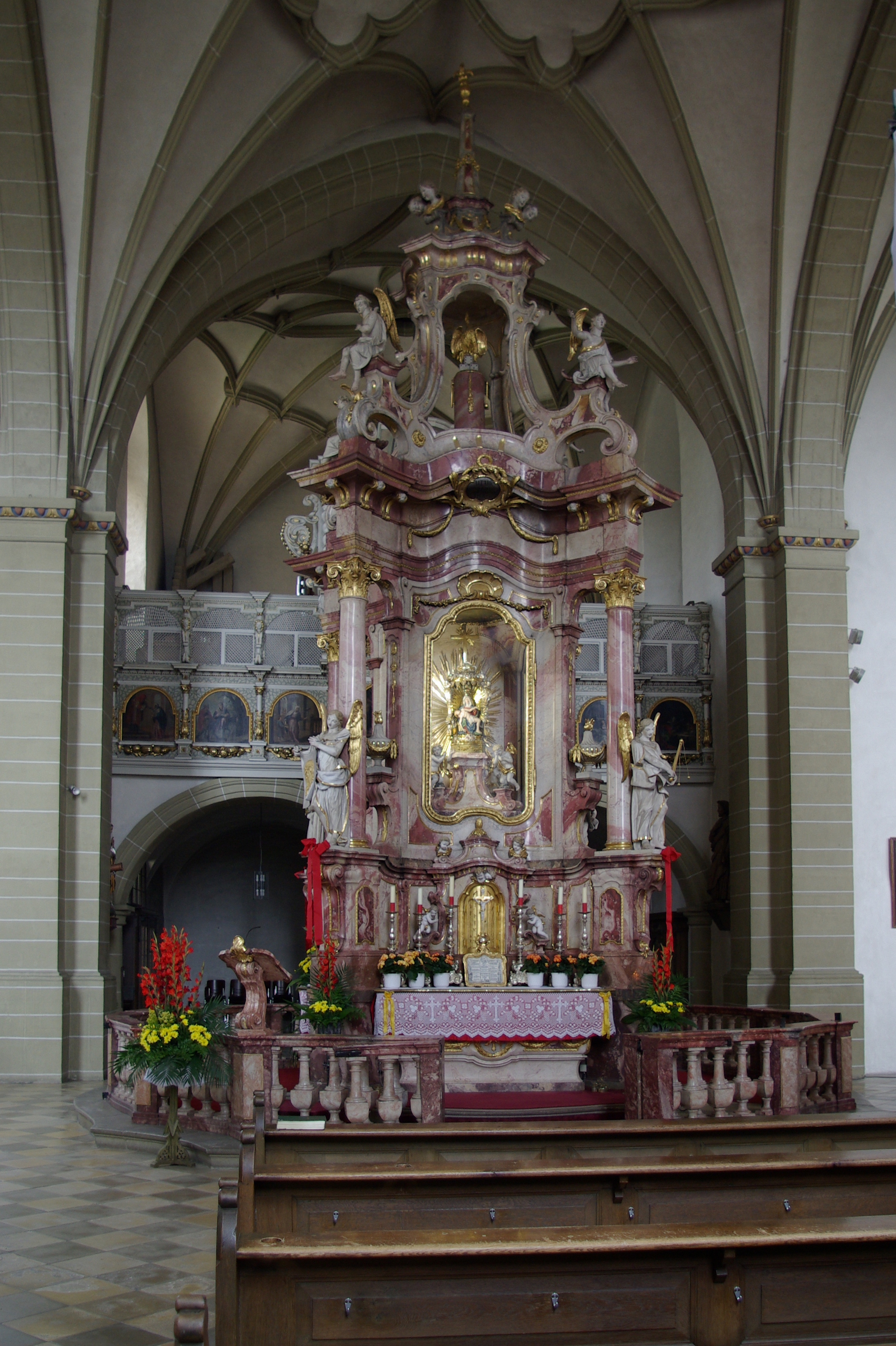 Dettelbach, Maria im Sand